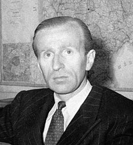 Jean Hérold-Paquis photographié lors de son premier interrogatoire à la Sûreté, Paris, 12 juillet 1945.